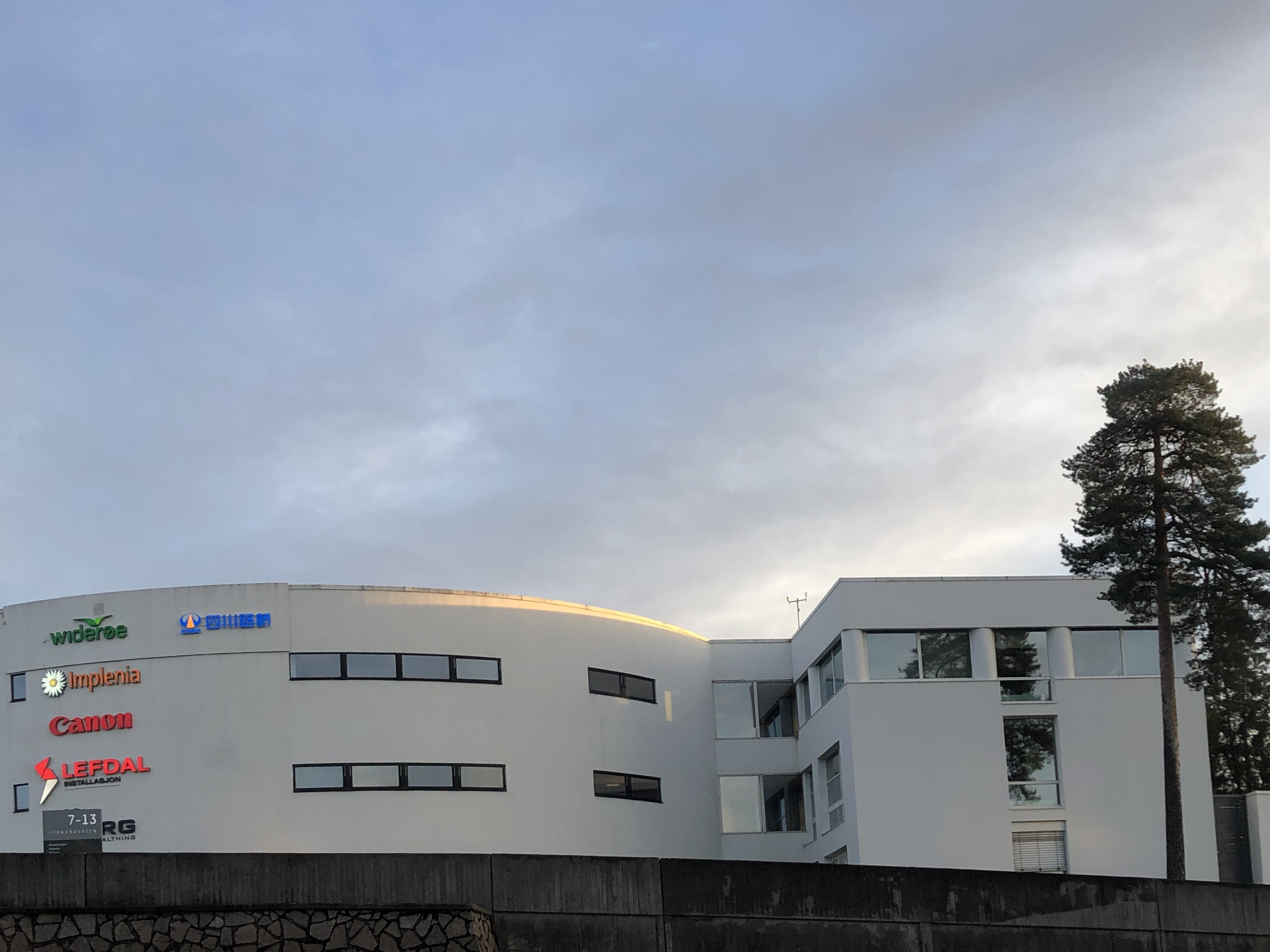 Fornebuveien 11, Lysaker